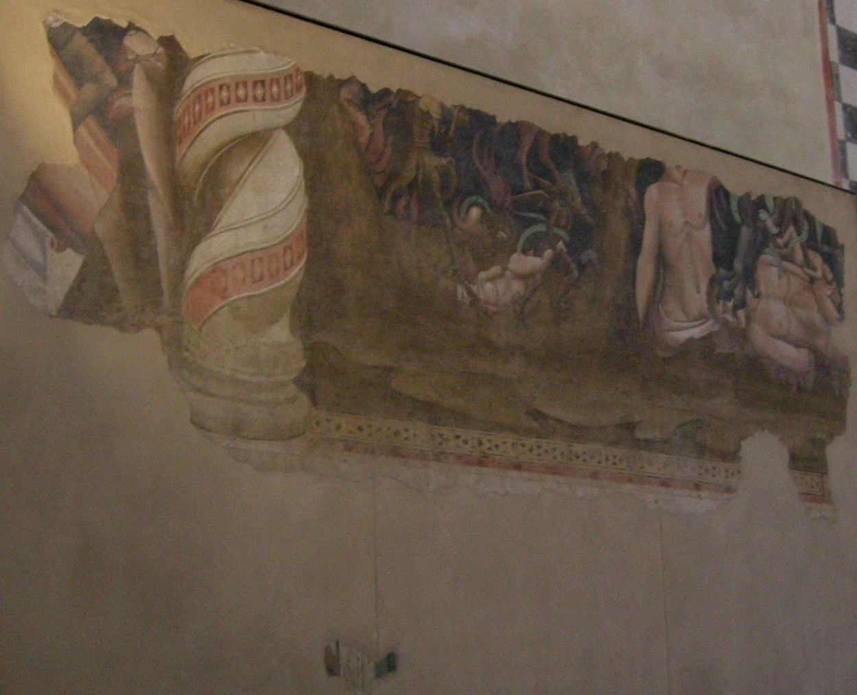 Refettorio santa croce, frammento di andrea orcagna